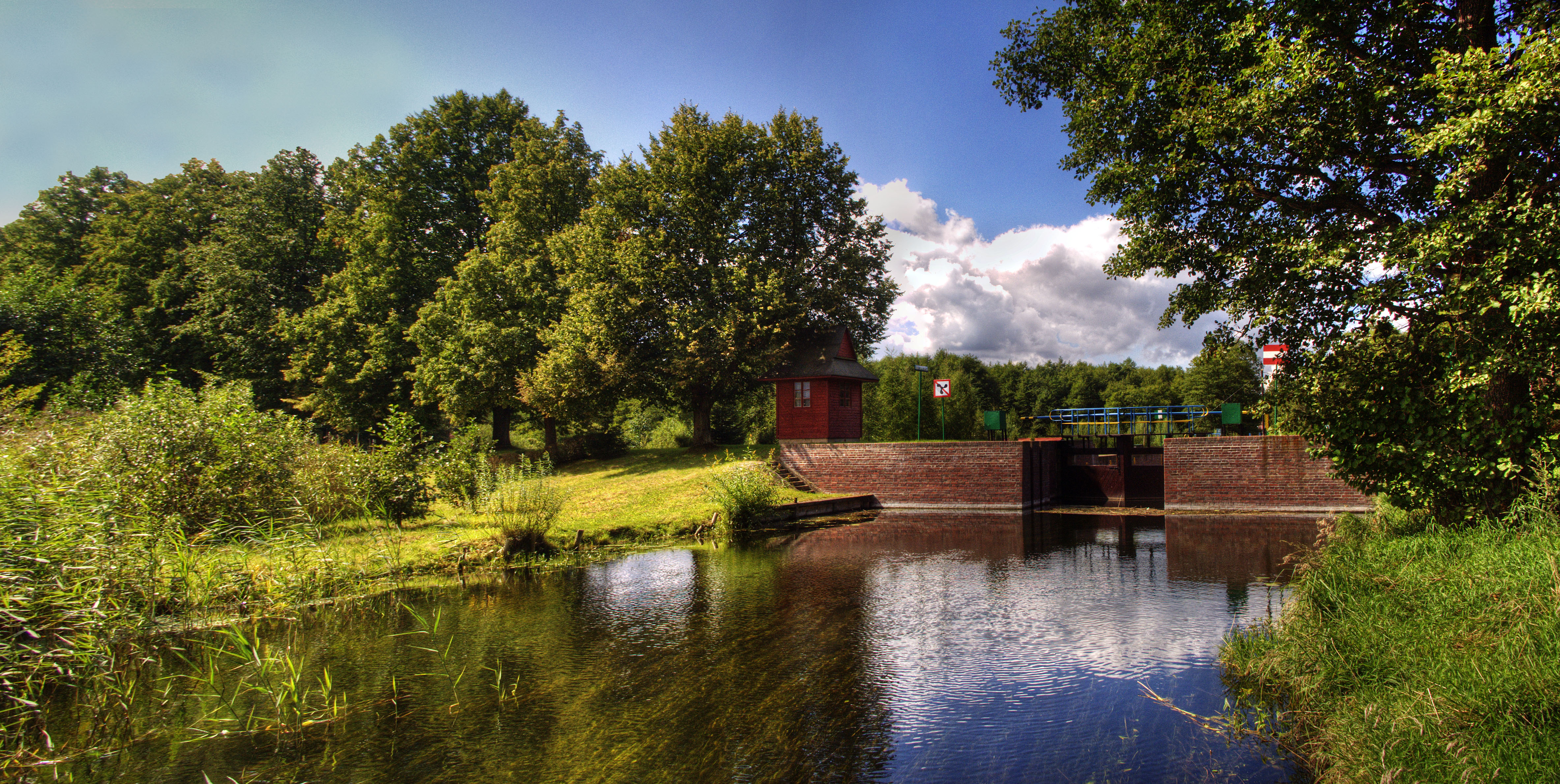 Rzeka Sapina, śluza w Przerwankach